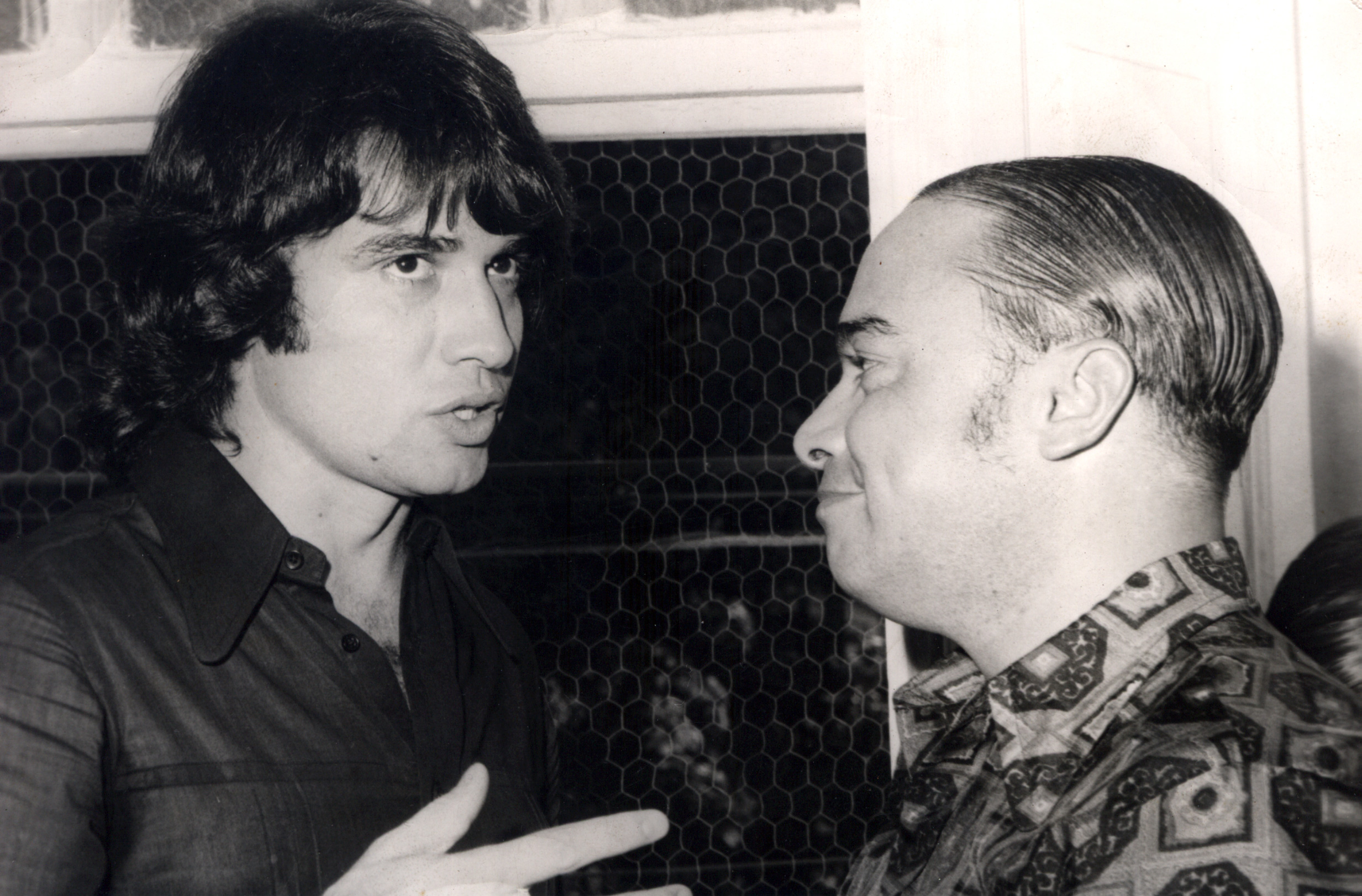 Foto de meados da década de 70, quando Sérgio Chapelin ainda era estudante de comunicação e intercalava a apresentação do Jornal Nacional e a faculdade de jornalismo, na Sobeu, em Barra Mansa - RJ, (atual Centro Universitário de Barra Mansa - UBM). Na imagem, Sérgio Chapelin conversa com o presidente da Sobeu, o professor Haroldo Carvalho Cruz.